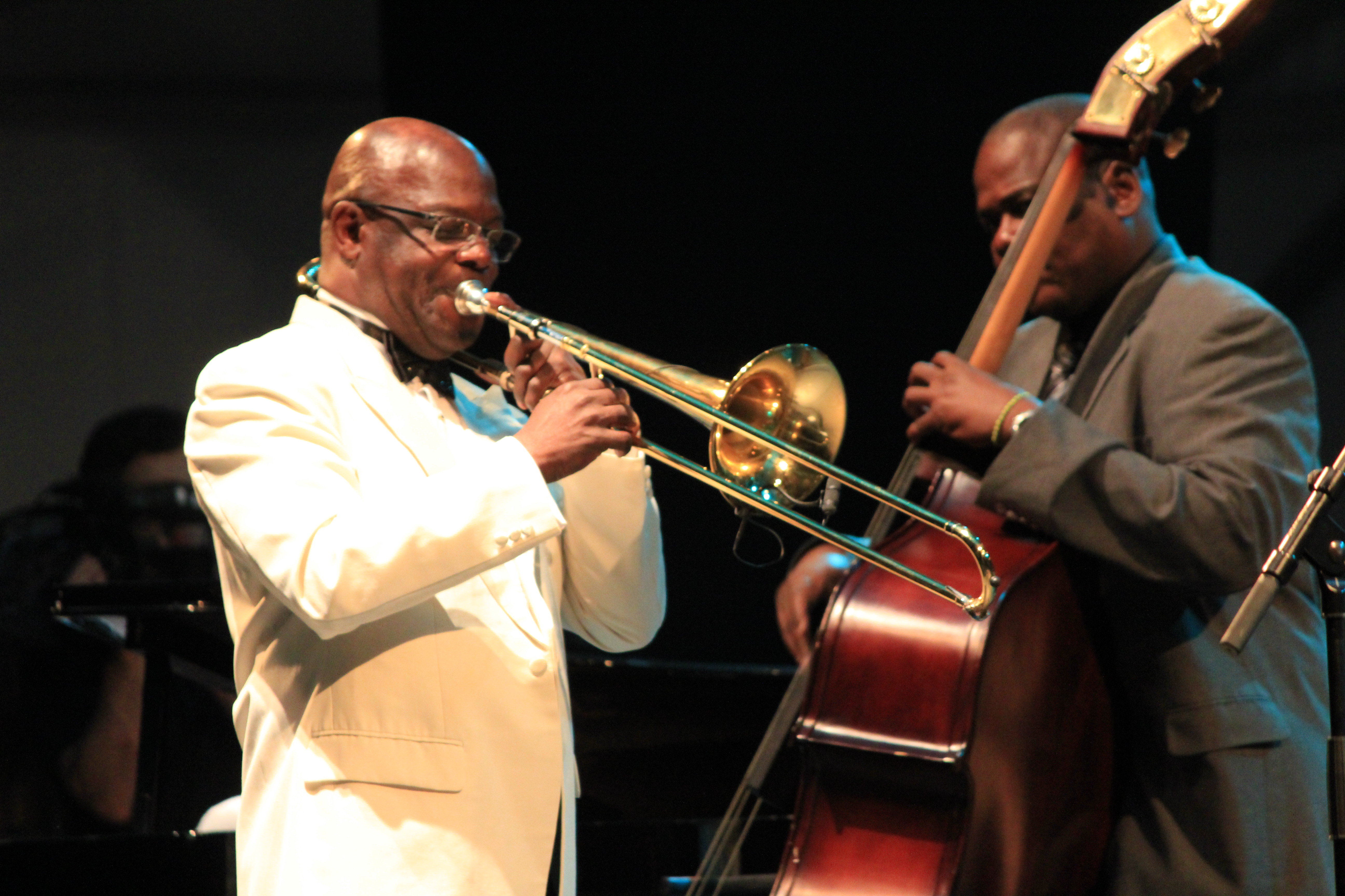 Orquesta Buena Vista Social Club pendant le Festival interceltique de Lorient avec Jesus 'Aguaje' Ramos